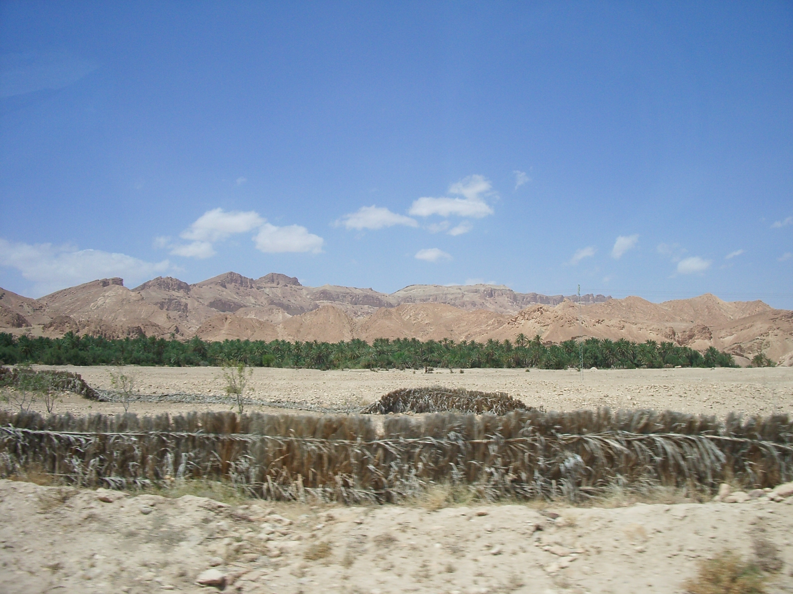 Djebel El Chouabine